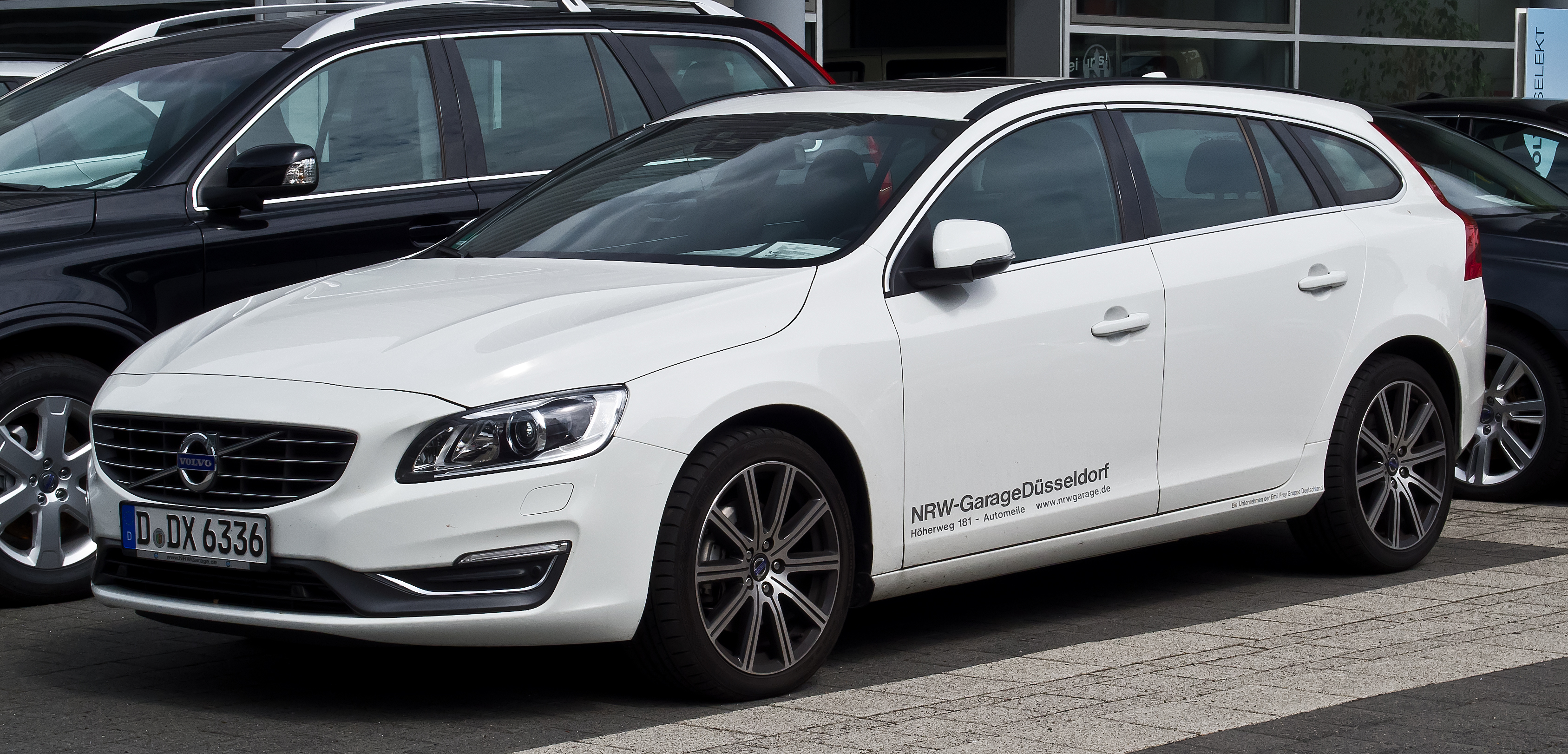 Volvo V60 D5 Summum (Facelift)